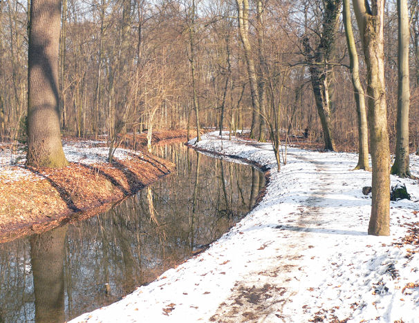 Lauf des Schiffgrabens in der Eilenriede